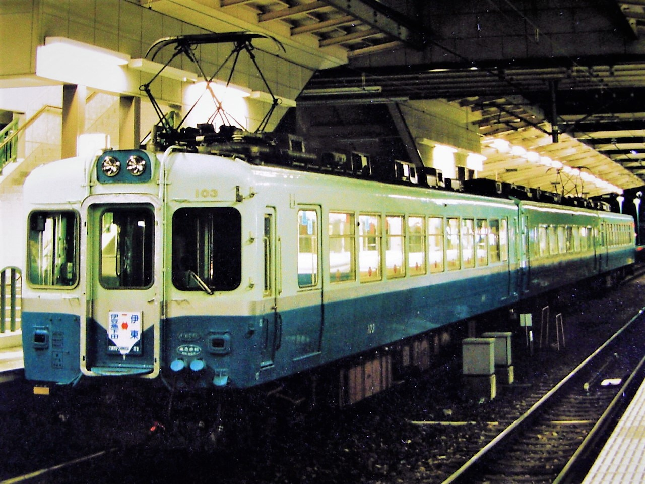 伊豆急行電鉄100系クモハ103